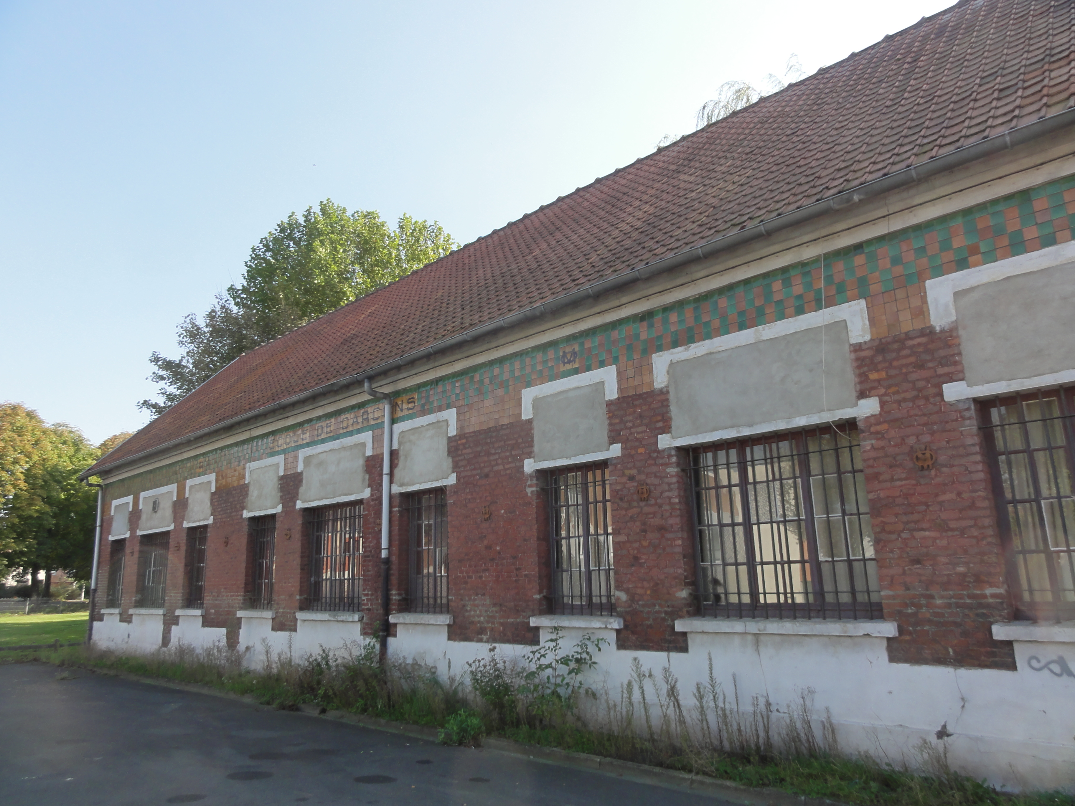 Écoles des cités de la Fosse n° 4 de la Compagnie des mines d'Ostricourt, Carvin, Pas-de-Calais, Nord-Pas-de-Calais, France.